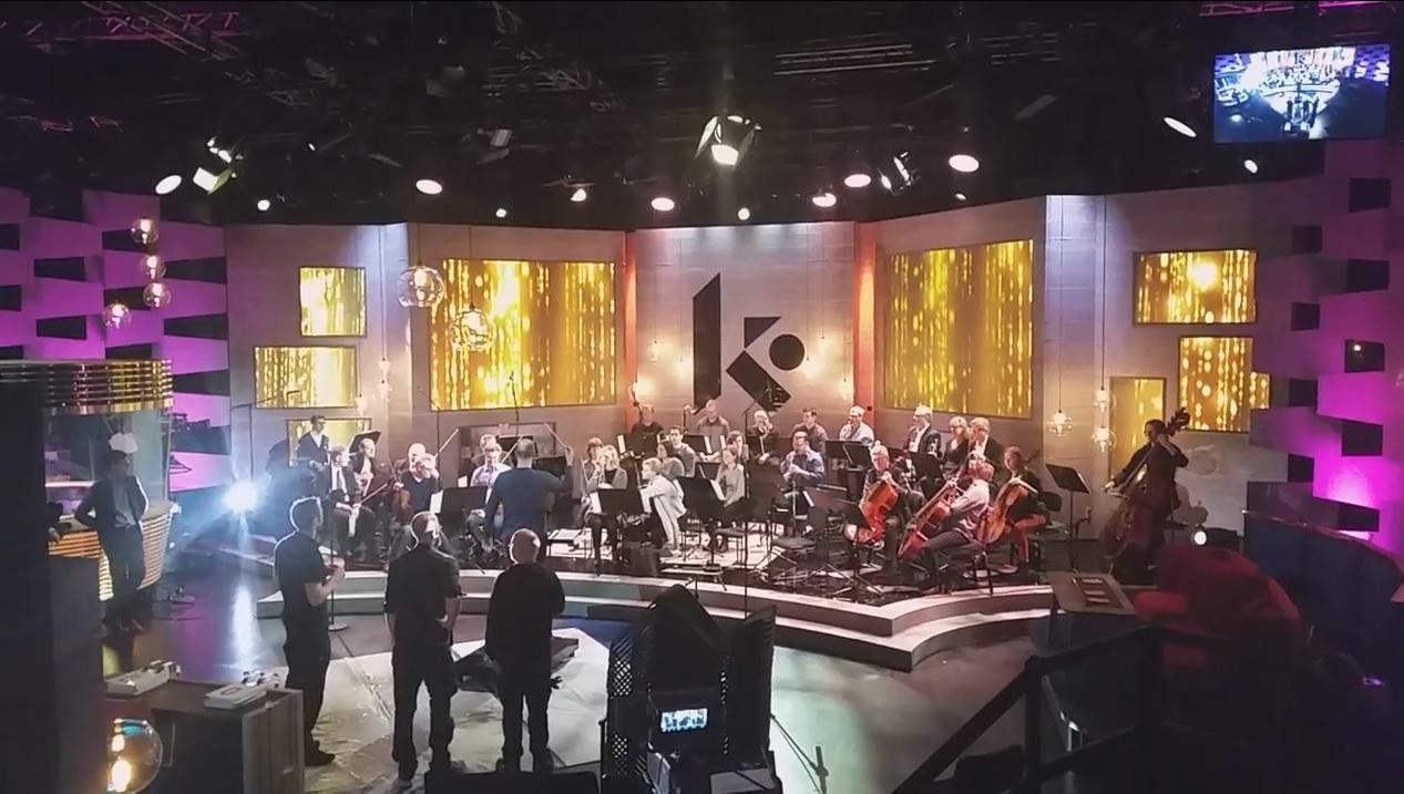 En musikrepetition i Kontrapunktstudion